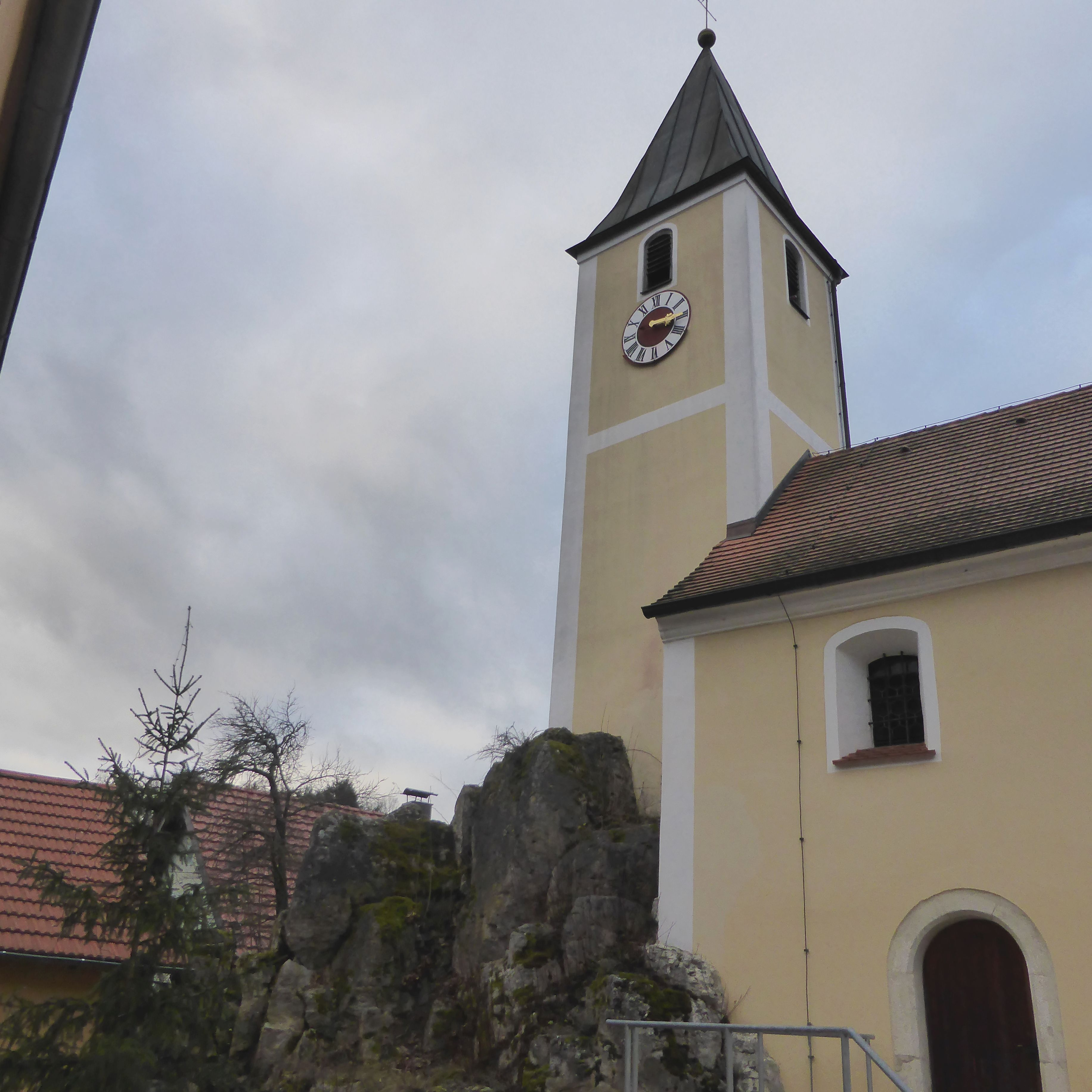 Schönhofen_(St._Johannes_Baptist)